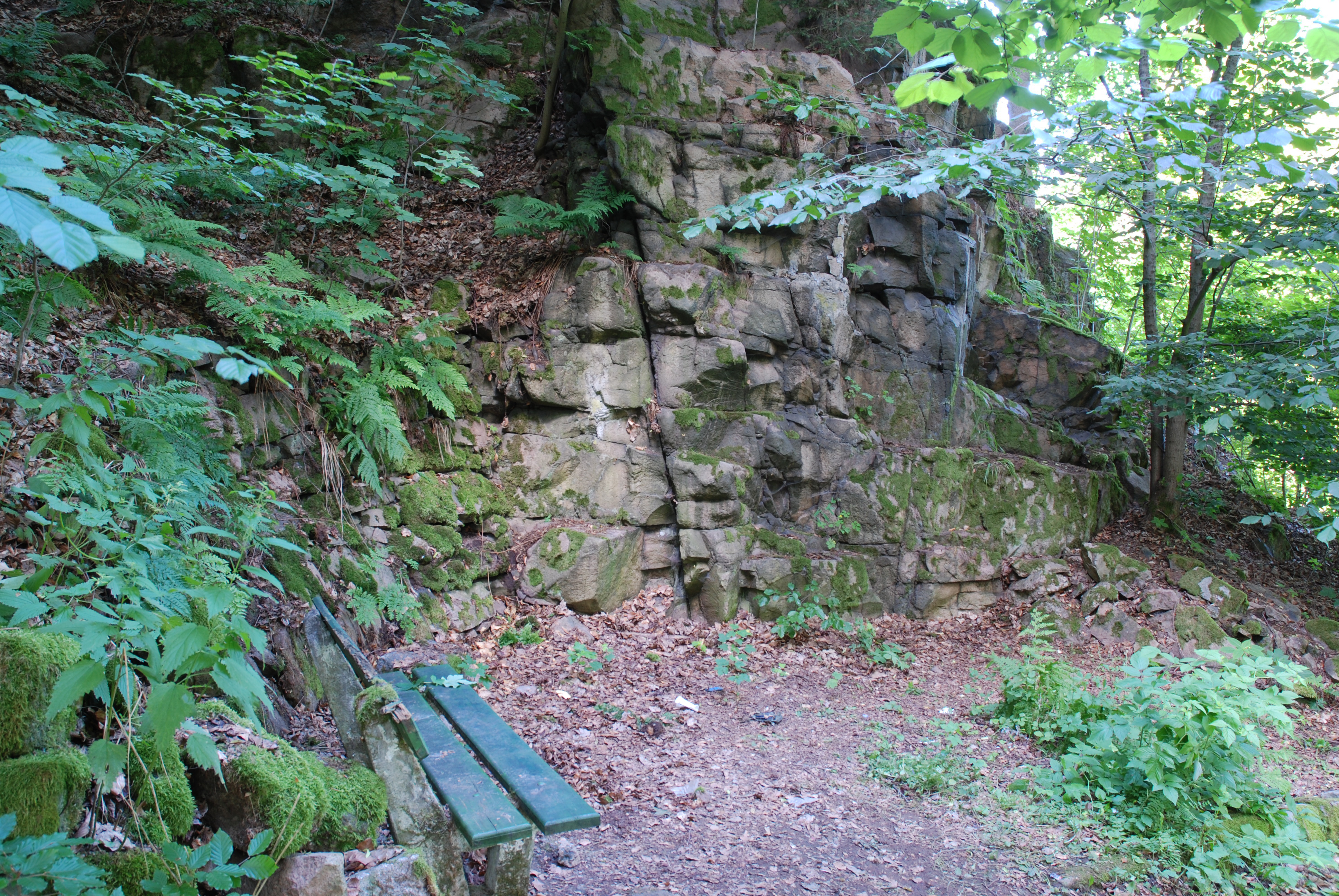 Lavička u skály kněžen / Fürstinnenstein v karlovarských lázeňských lesích (nad Galerií umění a pomníkem Friedricha Schillera)